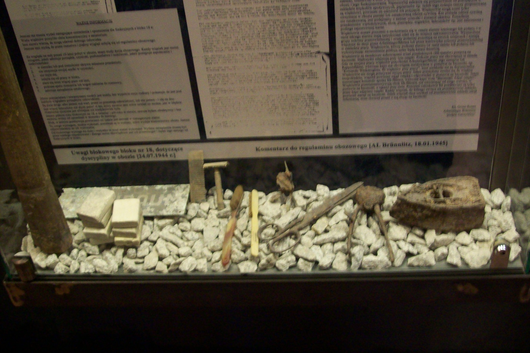 Eksponaty znajdujące się w muzeum KL Gross-Rosen w Rogoźnicy na Dolnym Śląsku